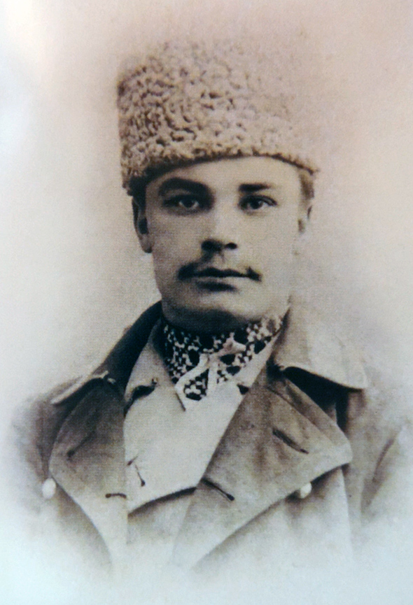 Винниченко Володимир Кирилович: Винниченко Володимир Кирилович